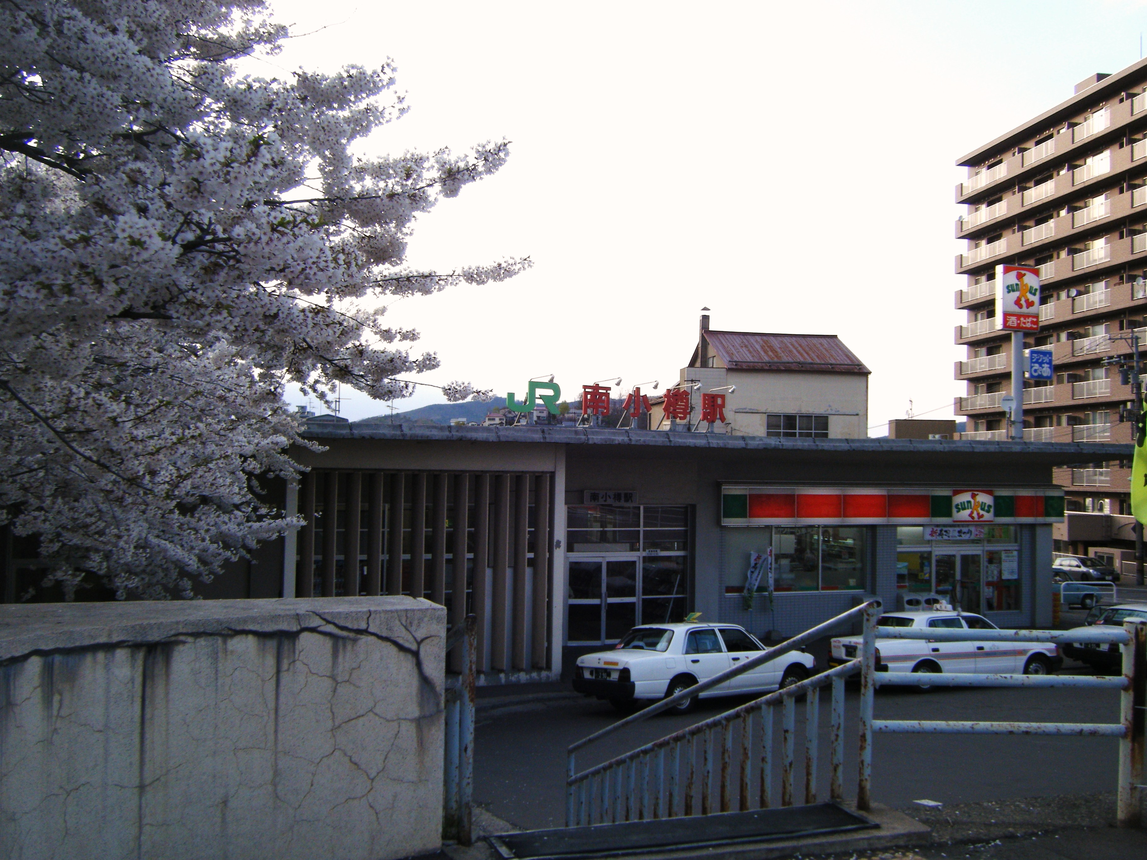 南小樽駅外観（JR北海道 函館本線）